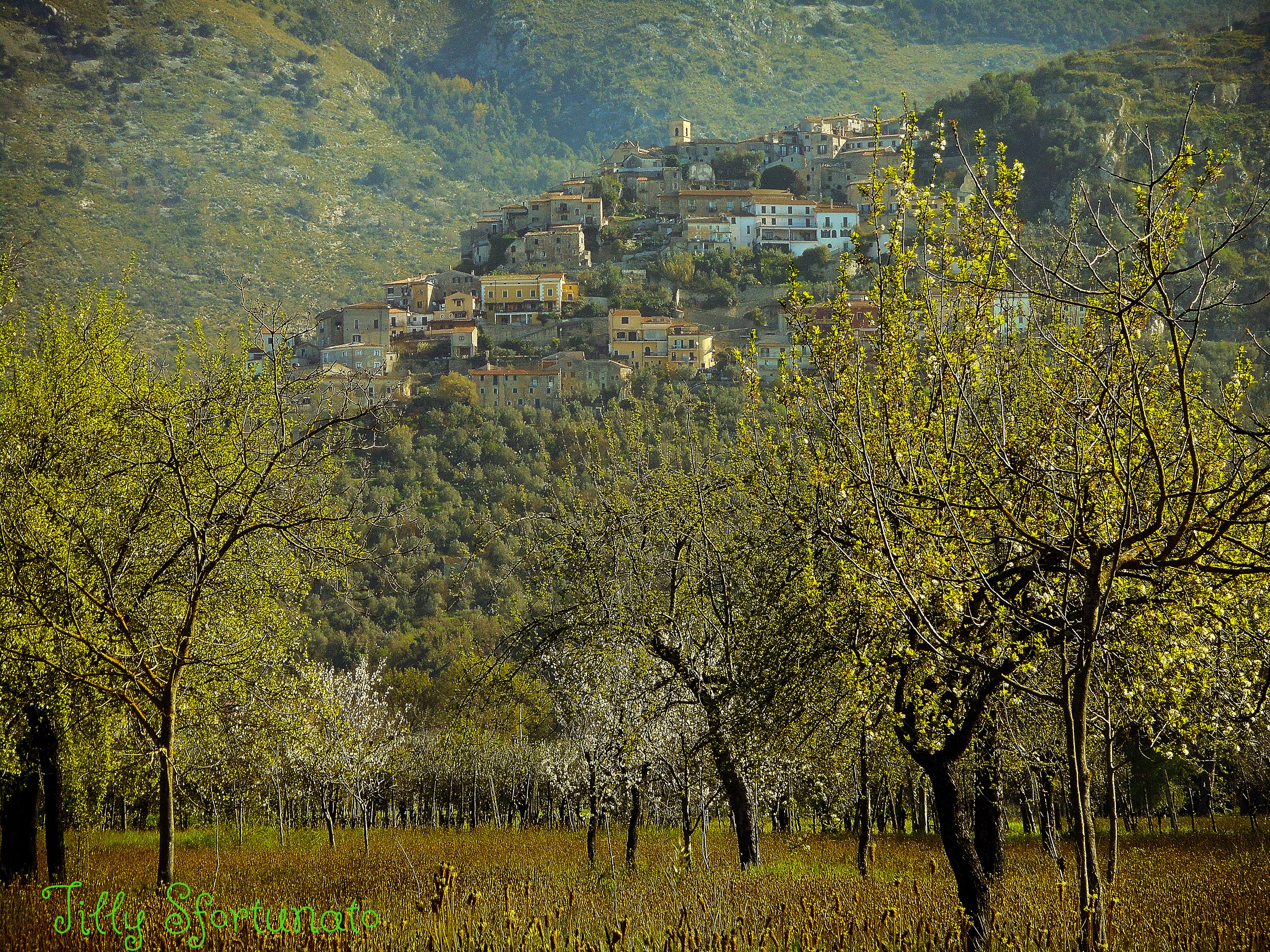 Roccasecca, Lazio, Italia